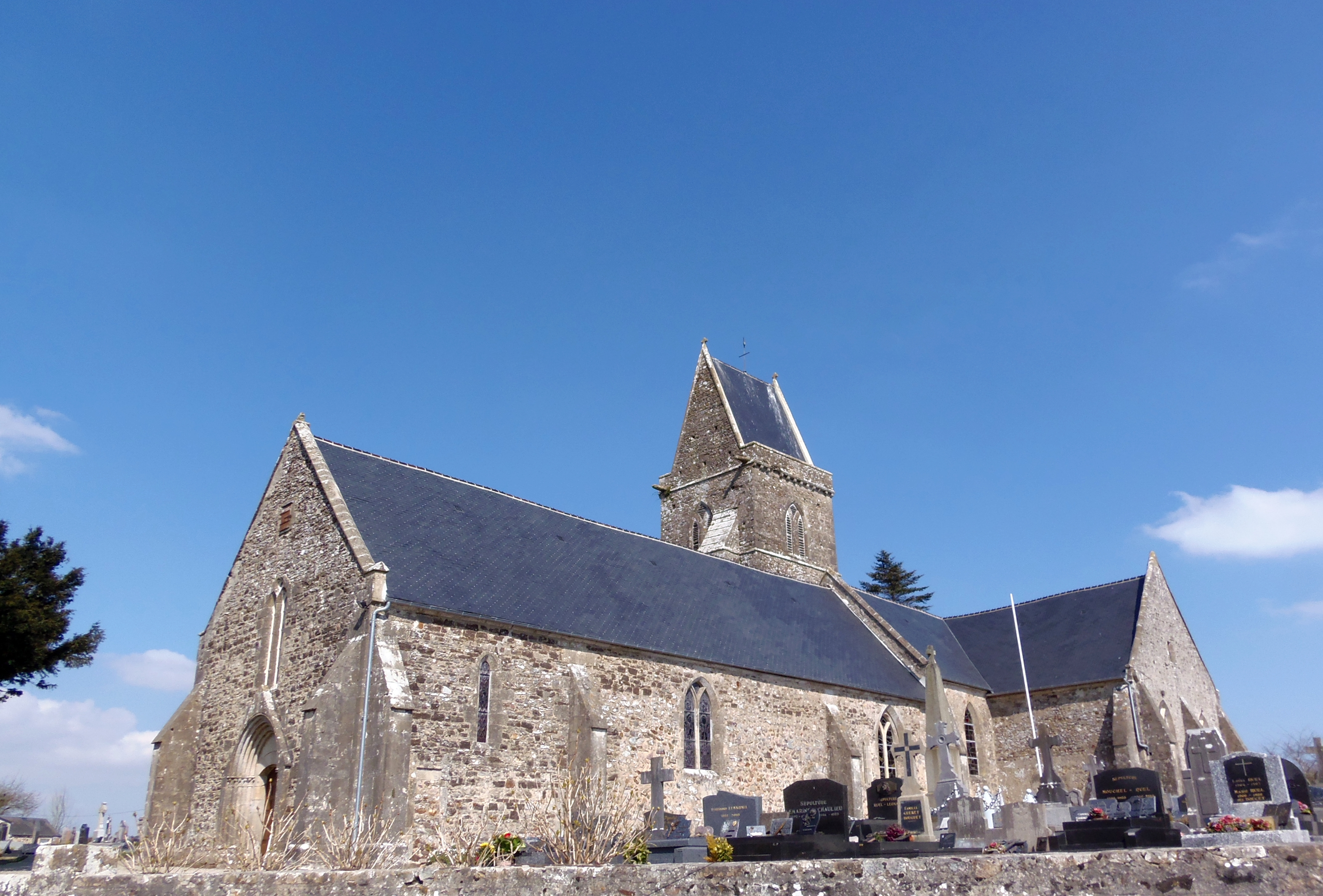 Octeville-l'Avenel (Normandie, France). L'église Saint-Martin.